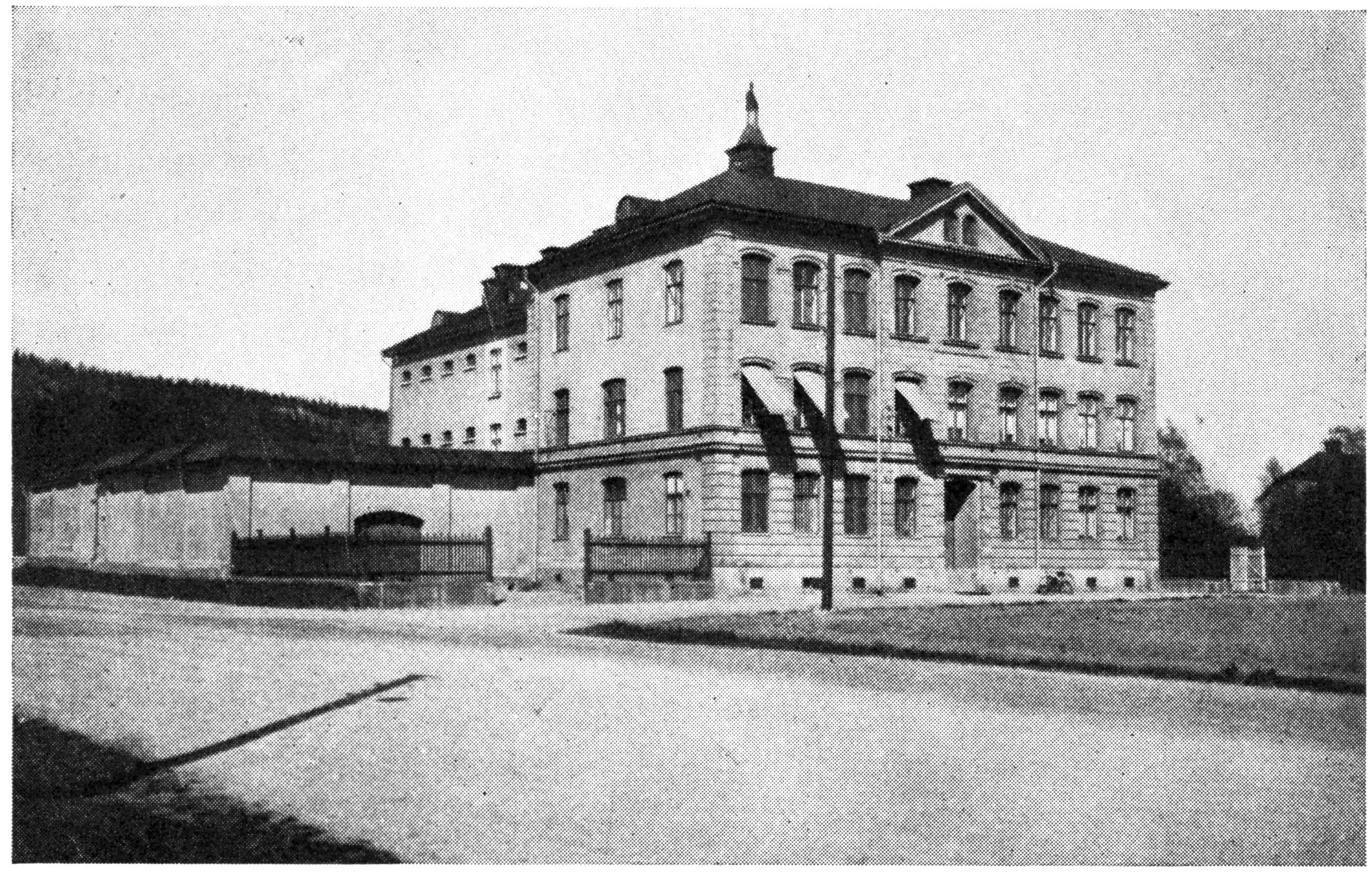 Kronohäktet i Sundsvall